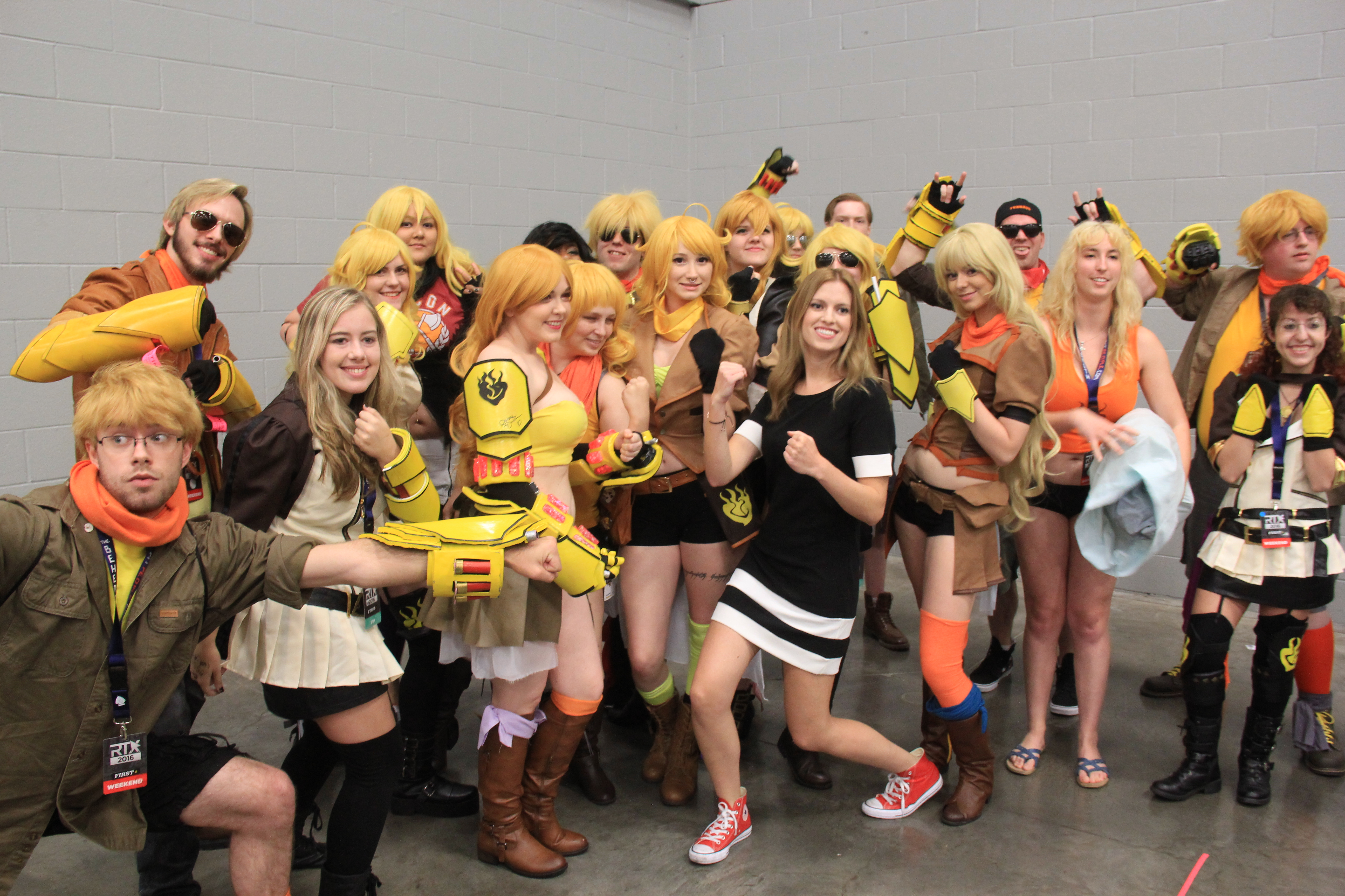 IMG_7933 Taken at RTX 2016.